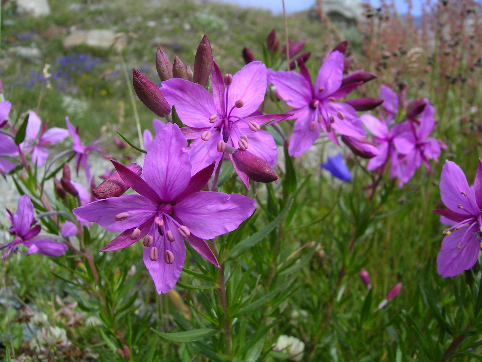 (en) Epilobium fleischeri (de) Fleischers Weideröschen (Epilobium fleischeri) Place/Ort: Berner Oberland, CH. Steingletscher, beim See.